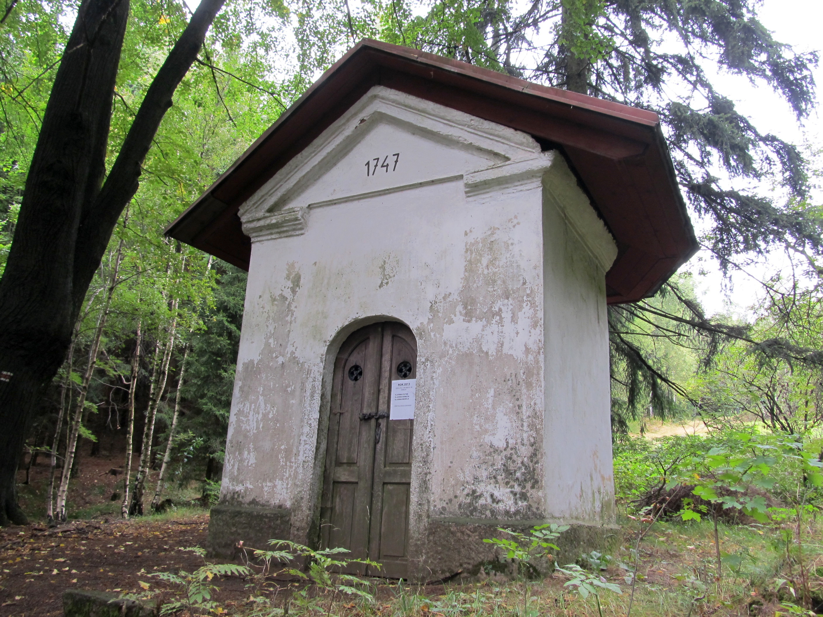 Kaplička sv. Tří králů (Petrovice), Petrovice